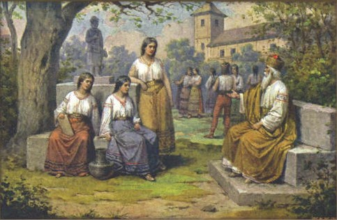 Josef Mathauser - Kníže Krok s dcerami (Kazi, Teta, Libuše)